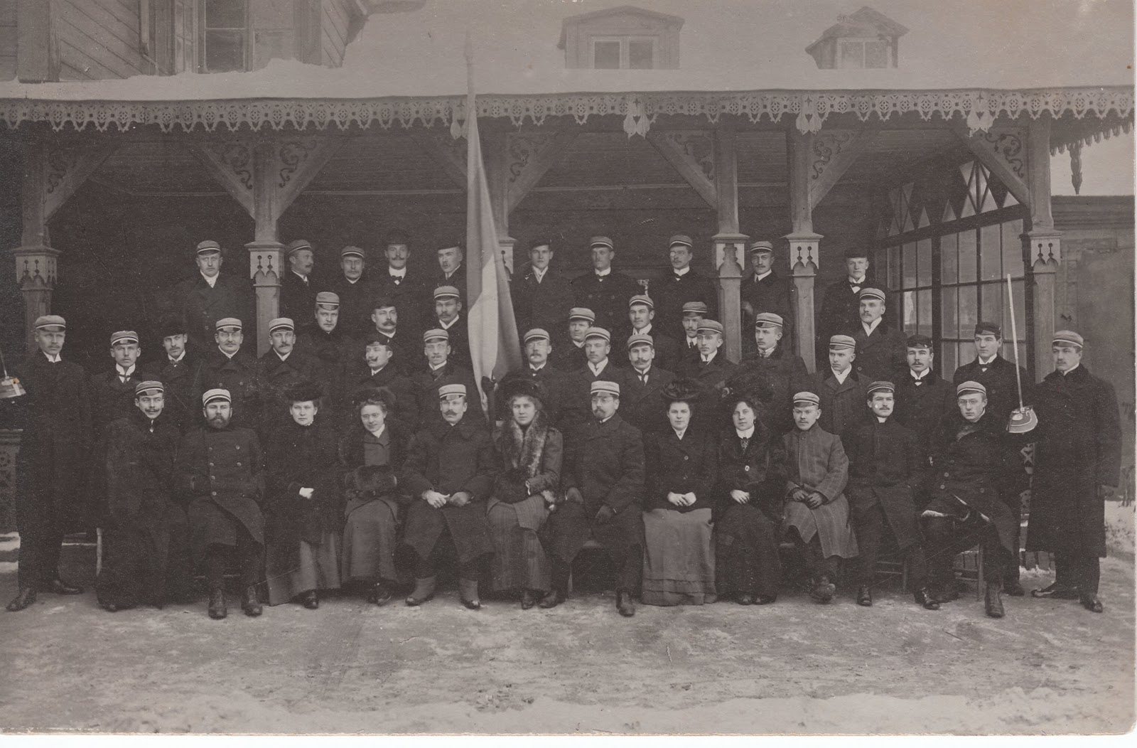 Korp! Sakala asutajad koos kaaslastega